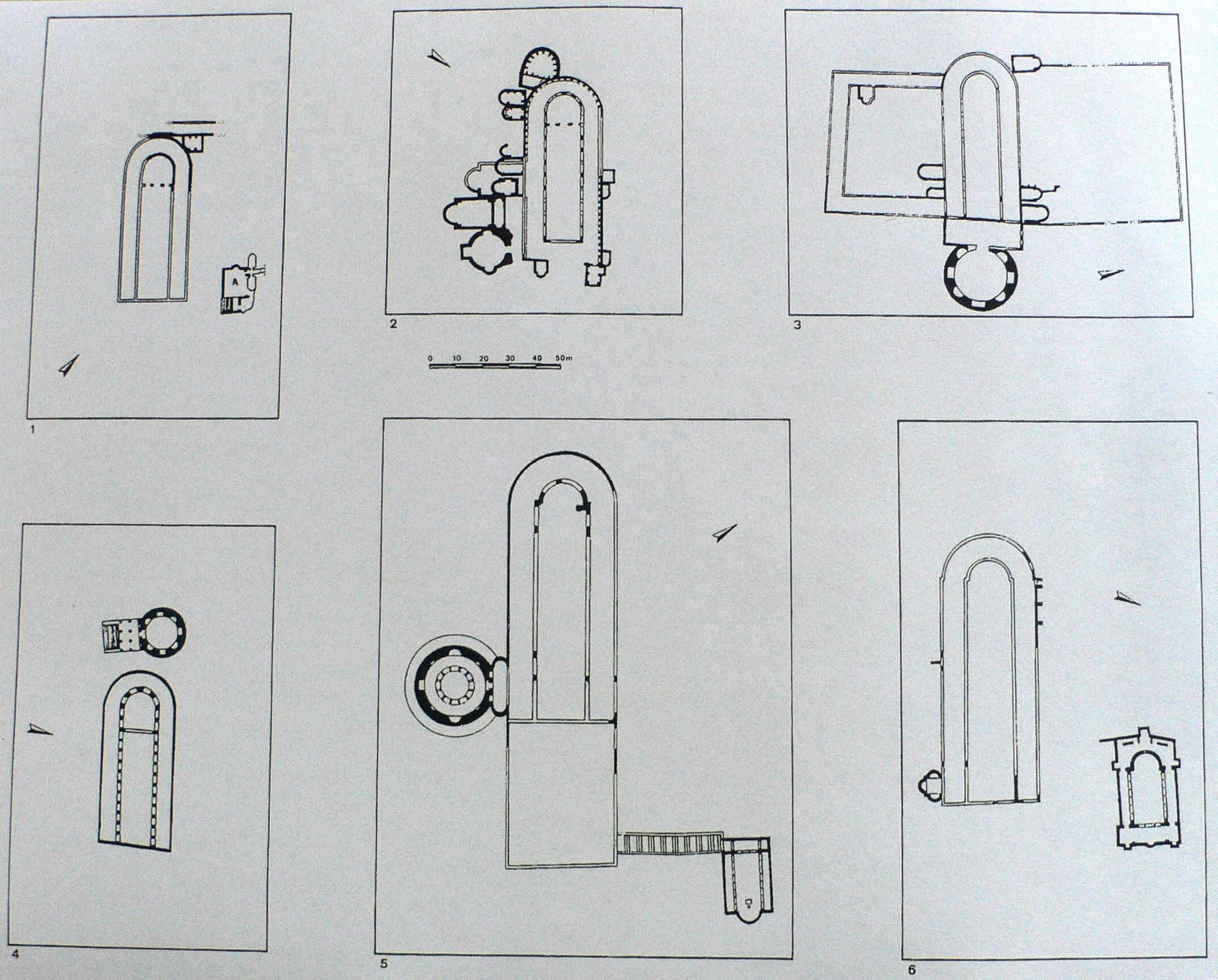 Grundrisse der sechs Umgangsbasiliken im gleichen Maßstab, aber mit unterschiedlicher Ausrichtung